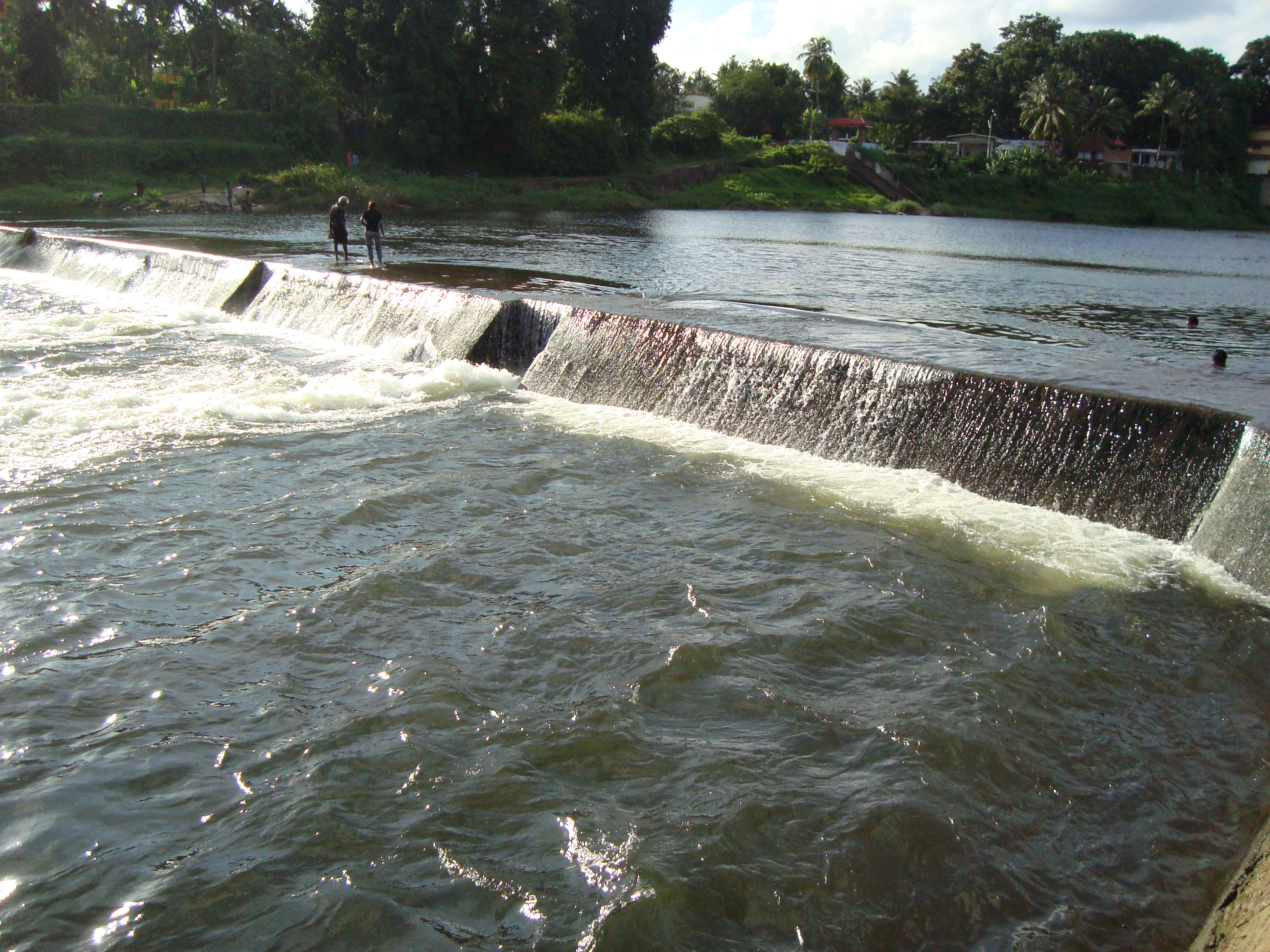 കൂടപ്പുഴ ചെക്ക് ഡാം (ചാലക്കുടിപ്പുഴ)